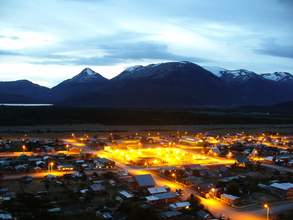 Ocaso en Villa O'Higgins (XI Región, Chile). "Finalizando el dia bajando del cerro santiago casi sin luz, eran casi las 11 PM."